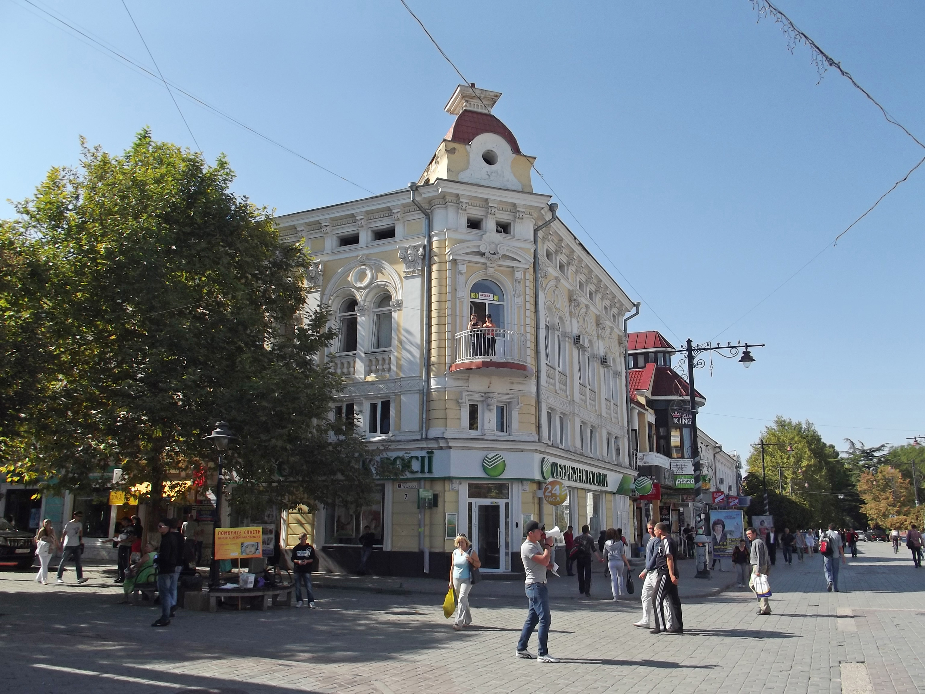 Пешеходная зона